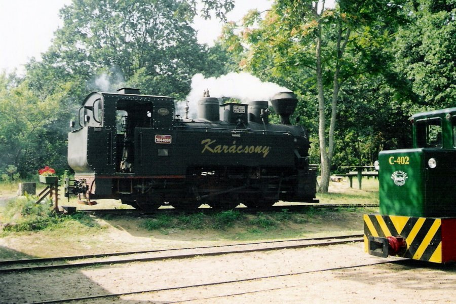 A kaszói keskeny nyomtávú gőzmozdony. (Somogy megye)